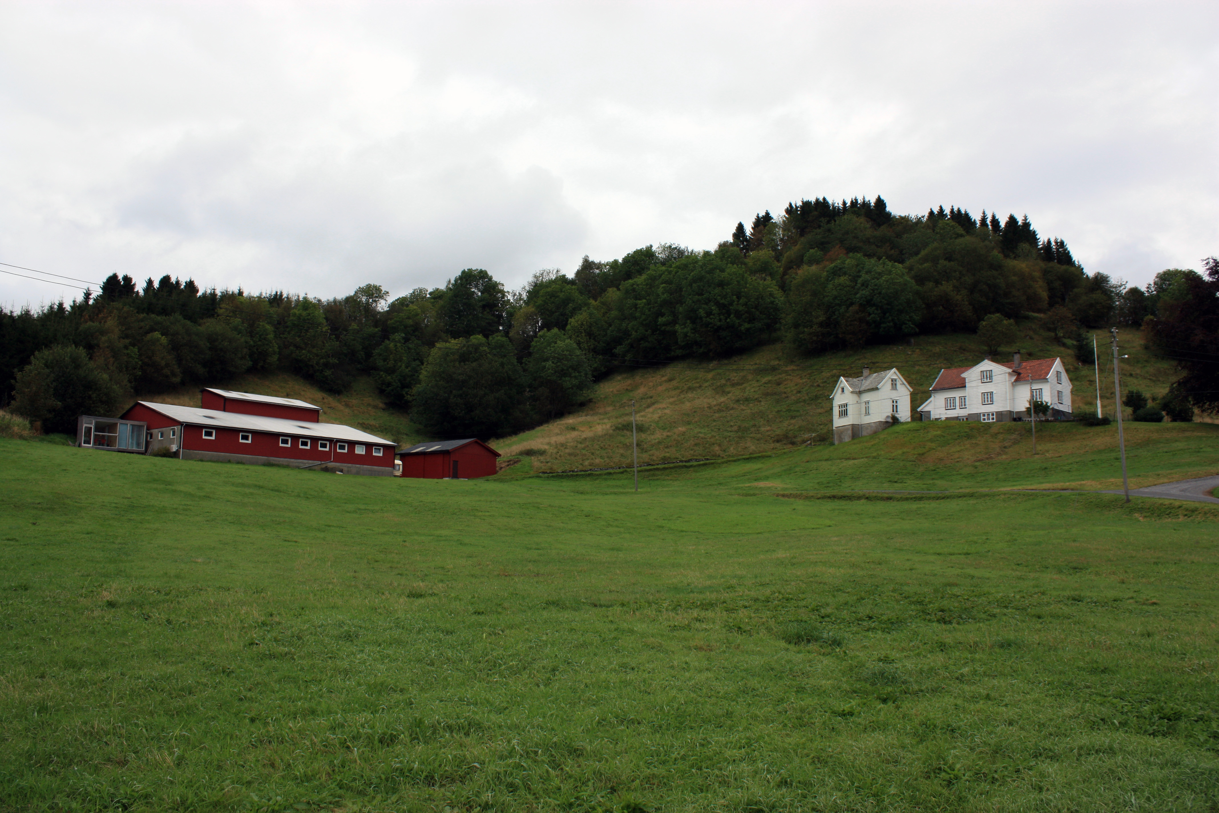 Kaland, Fana, Bergen.